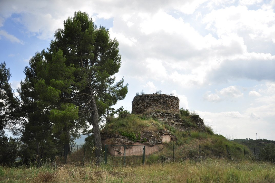 Castellet de Gotmar. Callús, Bages. Vista des del camí d'accés